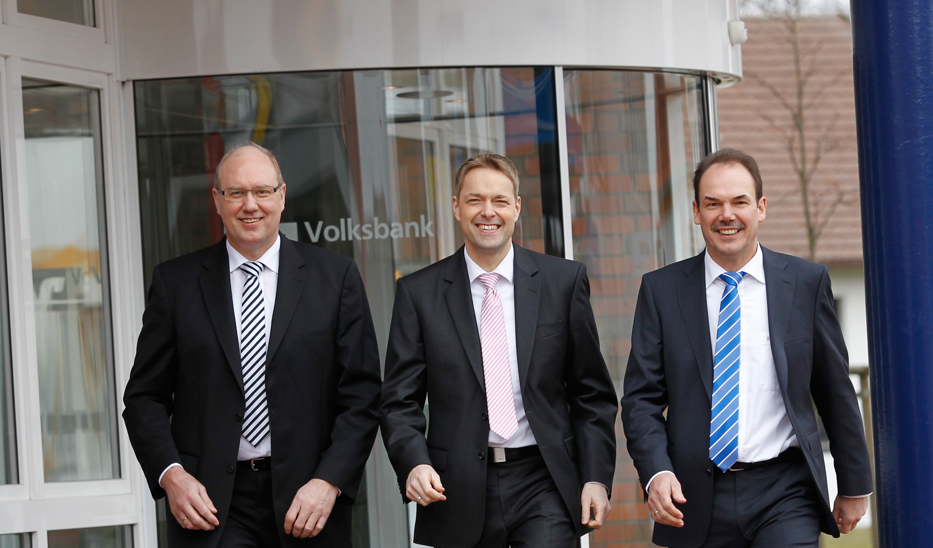 Die Vorstandsmitglieder der Volksbank Aller-Weser eG Wolfgang Dreyer, Stefan Ullmann und Elmar Eich (v.l.)